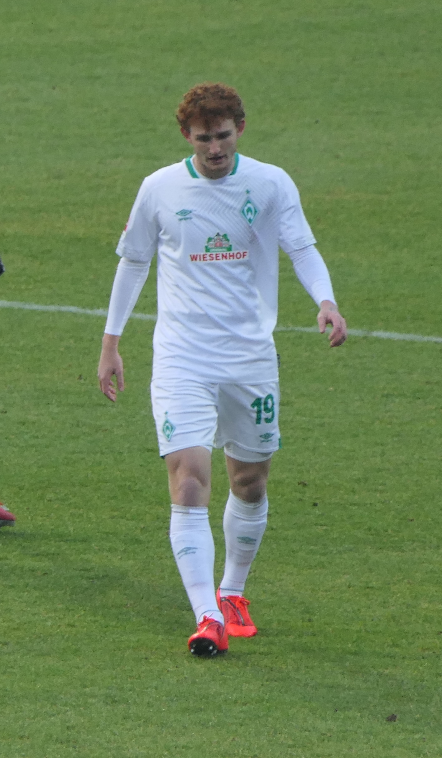 Der Fussballprofi Josh Sargent im Trikot vom SV Werder Bremen beim Auswärtsspiel gegen den 1.FC Nürnberg am 02.02.2019.